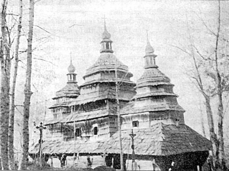 Церква Св. Михаїла в с. Хащованя, Львівська область